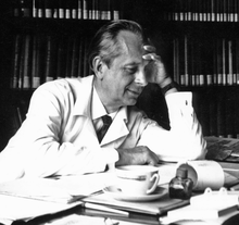 Imagine de Victor Sahleanu în biroul său